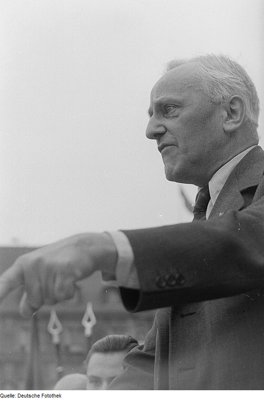 Original image description from the Deutsche FotothekErich Zeigner, eine Rede auf der "Opfer des Faschismus - Friedenskundgebung" haltend